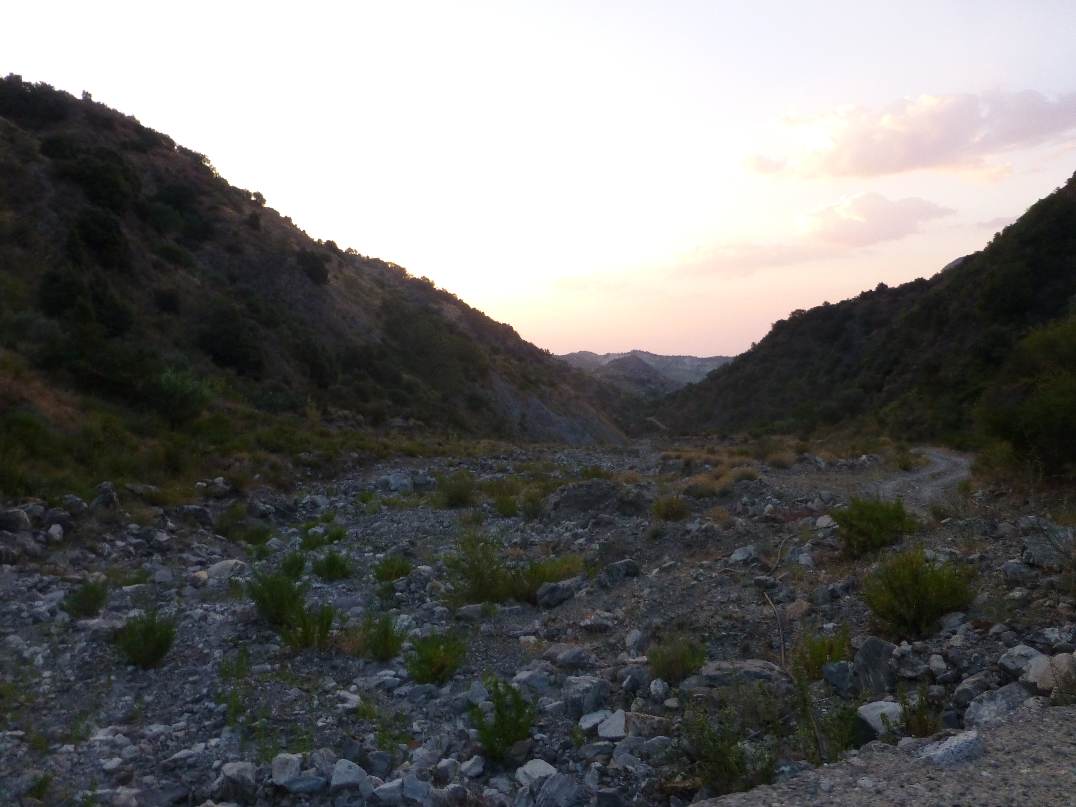 Torrente prosciugato del pardala all'alba agosto 2013